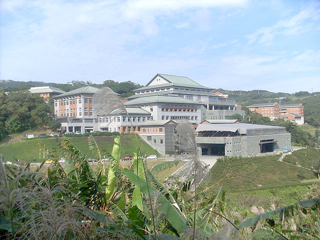 Общий вид на кампус Фагушань с юго-западной стороны